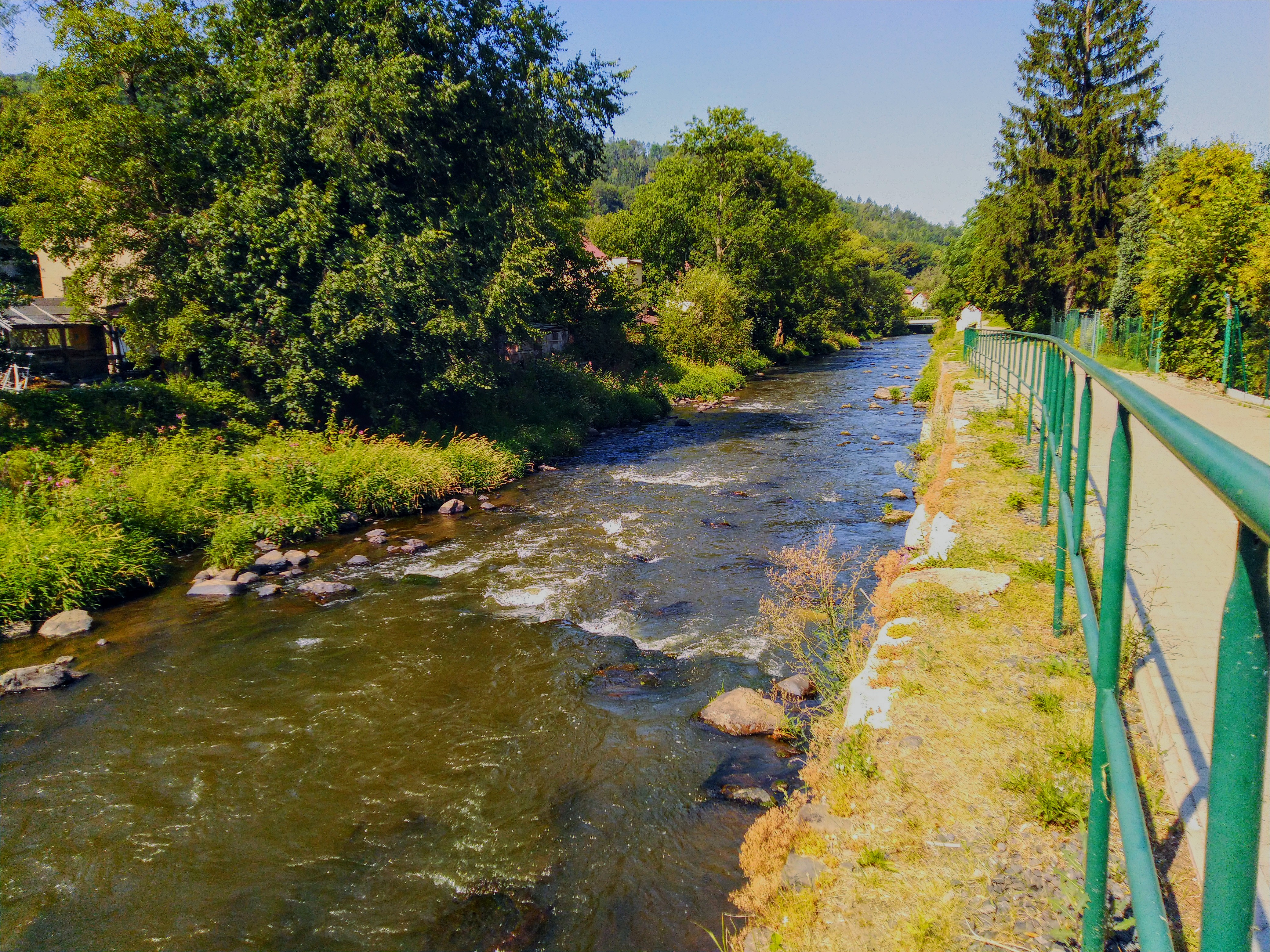 Řeka Ploučnice v Děčíně (městská část Březiny).